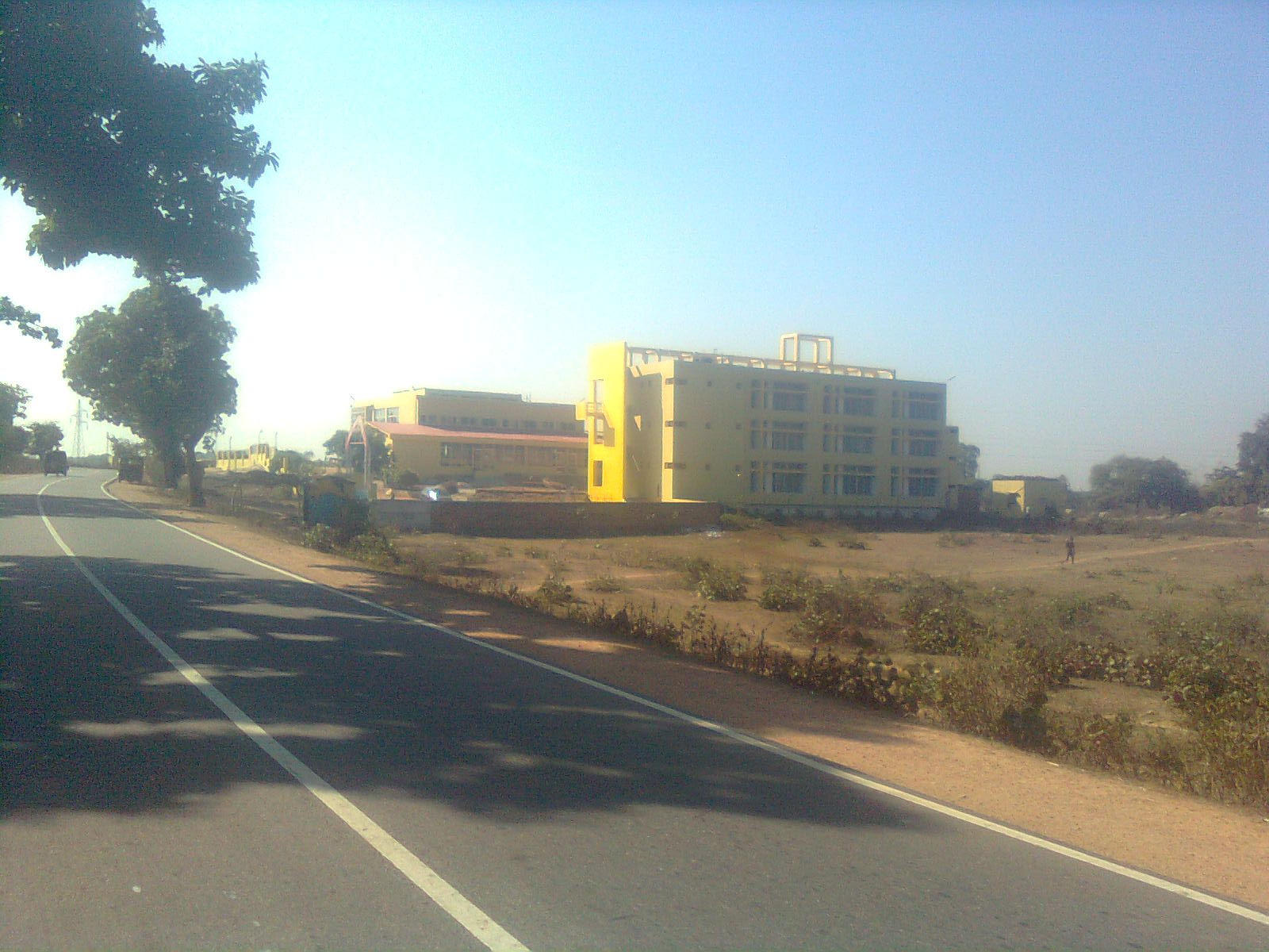 Tikamgarh